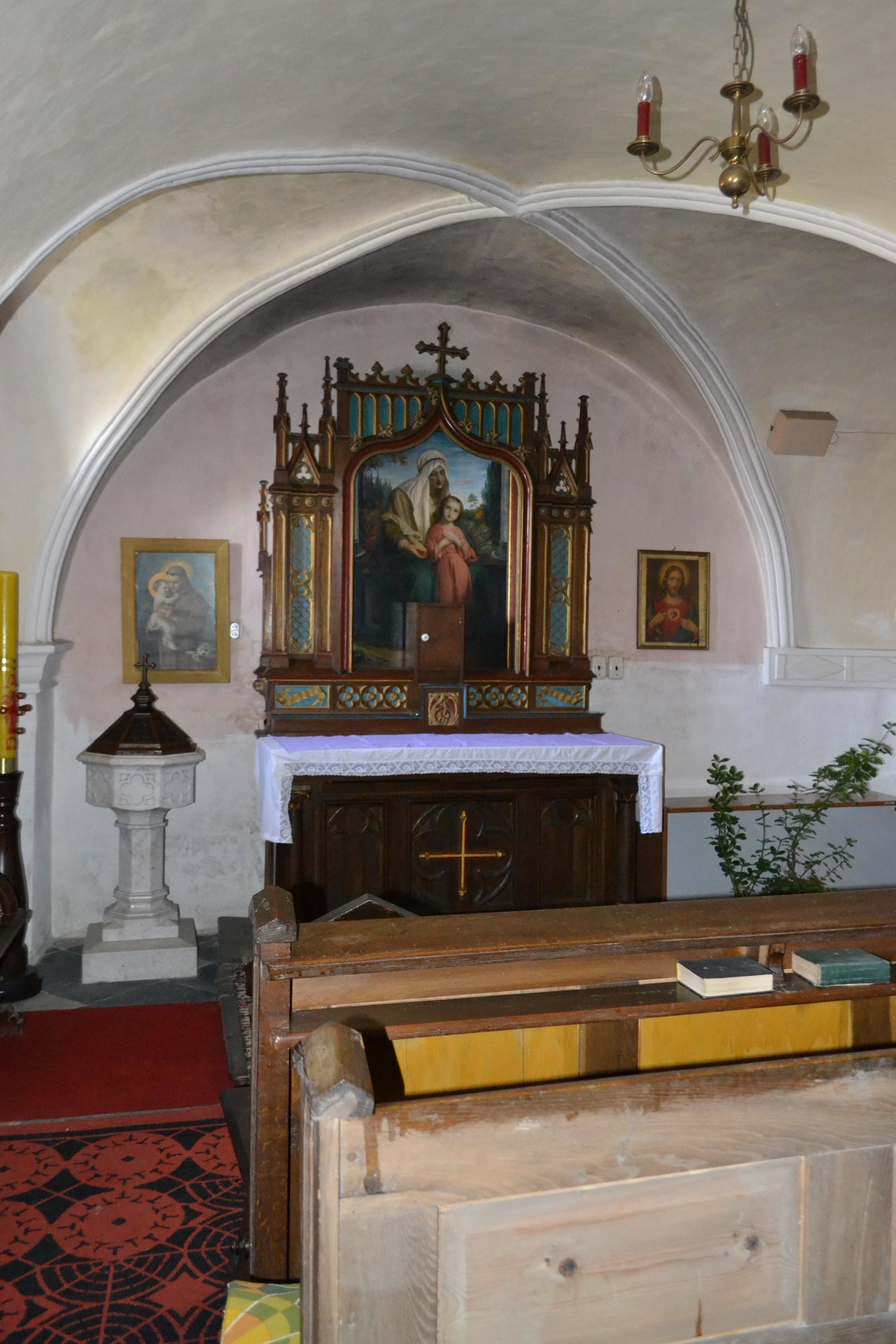 kaple sv. Anny v kostele Nejsvětější Trojice (Raduň, Moravskoslezský kraj, Česká republika)